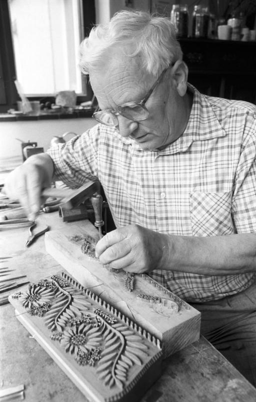 Pulsnitz, Formstecher ADN-ZB/Häßler 18.8.89 Bez. Dresden: Formstecher Druckstöcke mit Ornamenten und Figuren für Blaudruckwerkstätten fertigt der 58jährige Ewald Drechsler in seiner Pulsnitzer Werkstatt. Er übernahm das seltene Handwerk von seinem Vater. Zunächst zeichnet der Formstecher das Muster nach Kundenwunsch auf weiches Birnbaumholz. Dann schlägt er in vorgebohrte und - gestochene Löcher (Retentionen) Messingstifte und -stege (Foto) und erhält so einen Druckstock für das klassische Hochdruckverfahren.